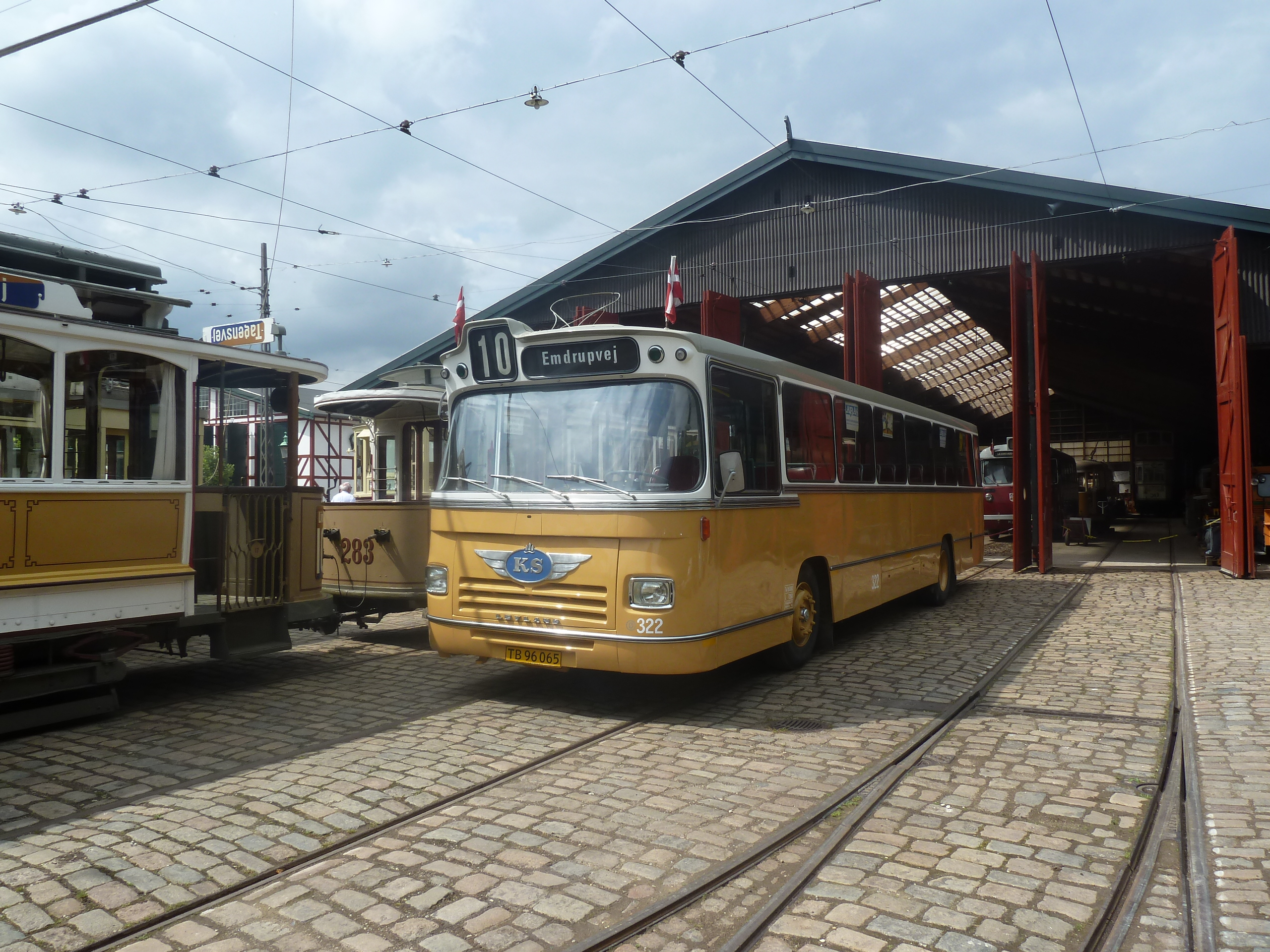 Old bus from Copenhagen, KS 322, Sporvejsmuseet Skjoldenæsholm in Denmark.